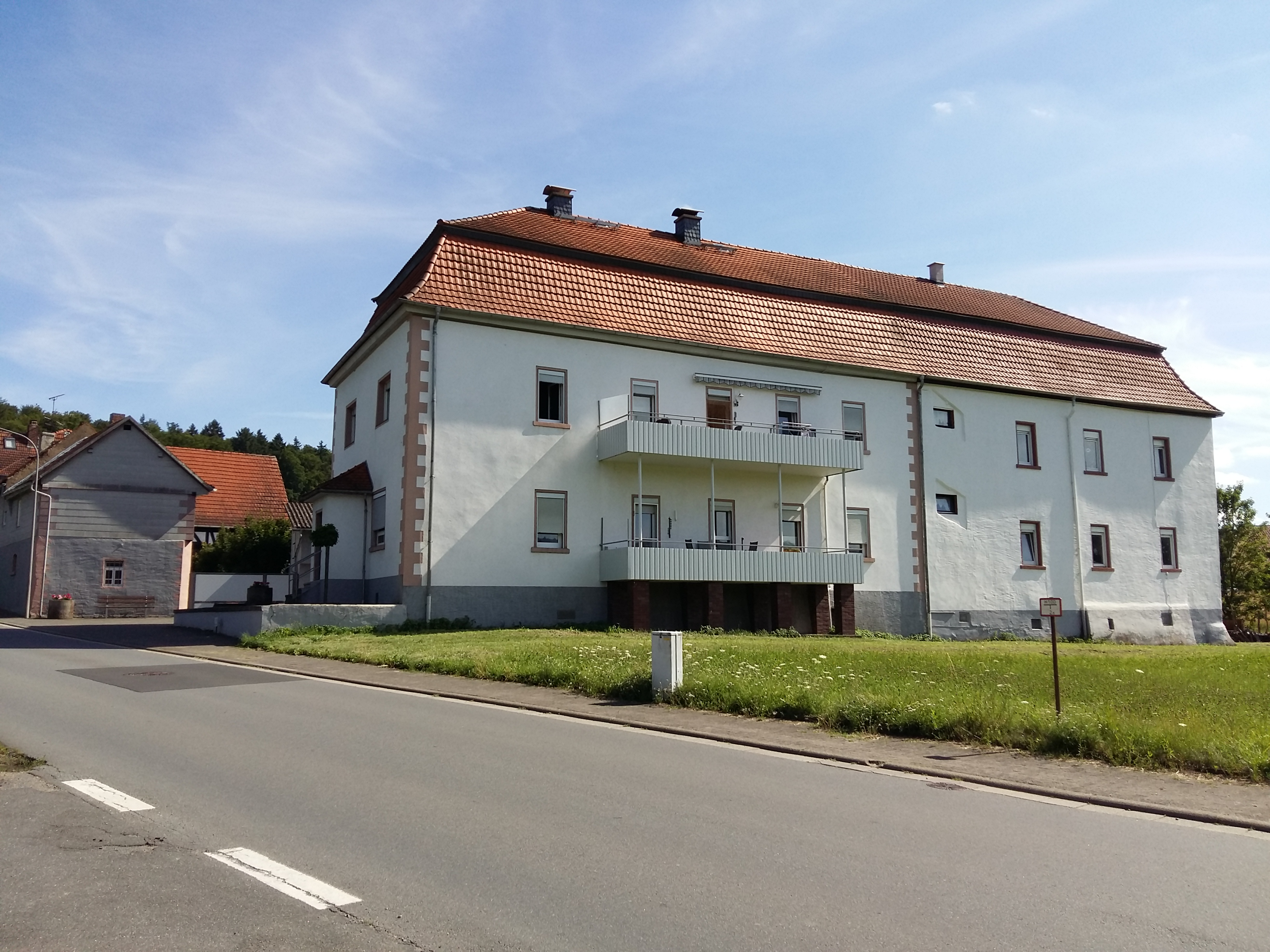 Herrenhaus des Schrautenbach'scher Hofs in Groß-Bieberau - Rodau von Süden